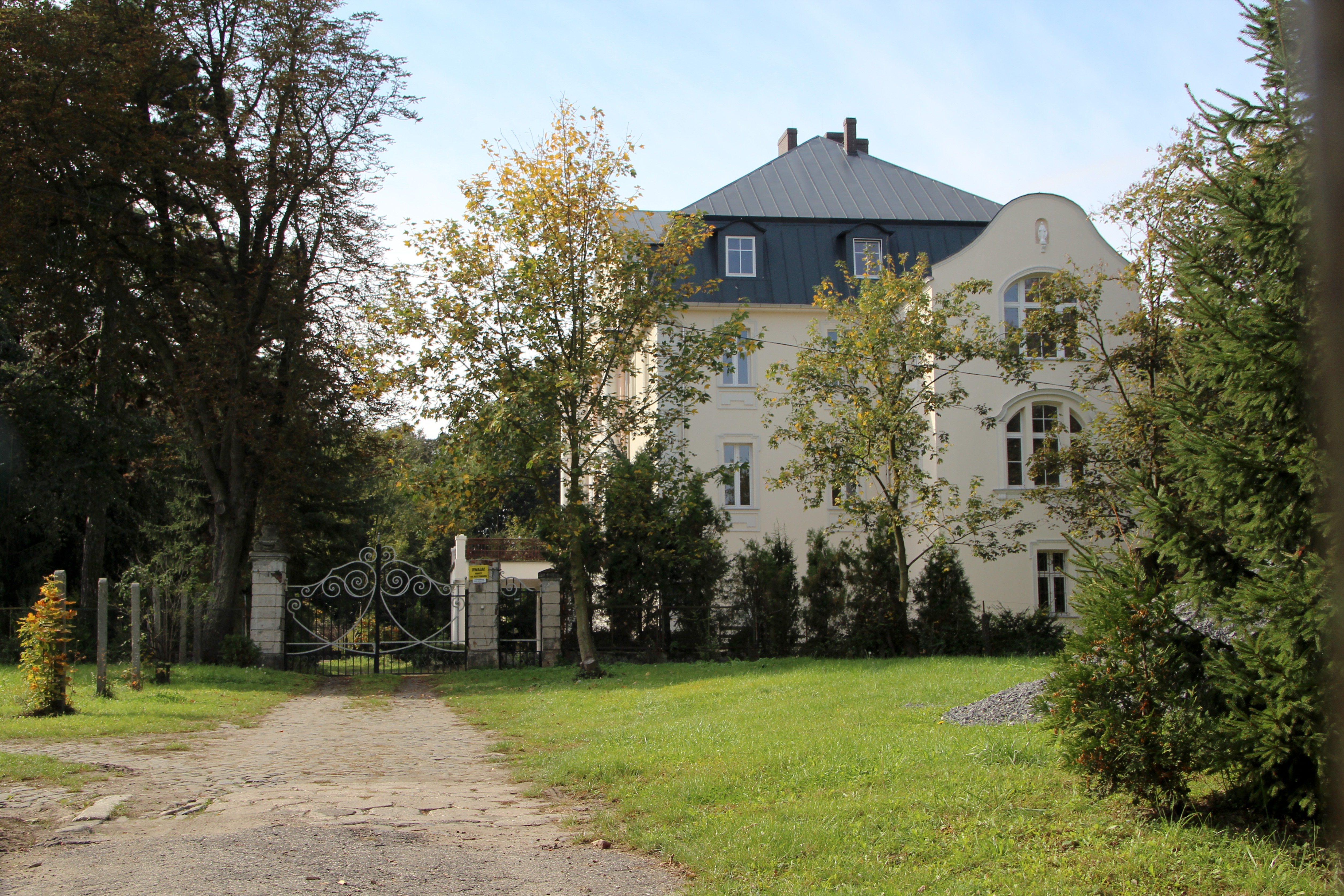 Ciężkowice (w j. niem. Czienskowitz) – wieś w Polsce położona w województwie opolskim, w powiecie kędzierzyńsko-kozielskim, w gminie Polska Cerekiew.